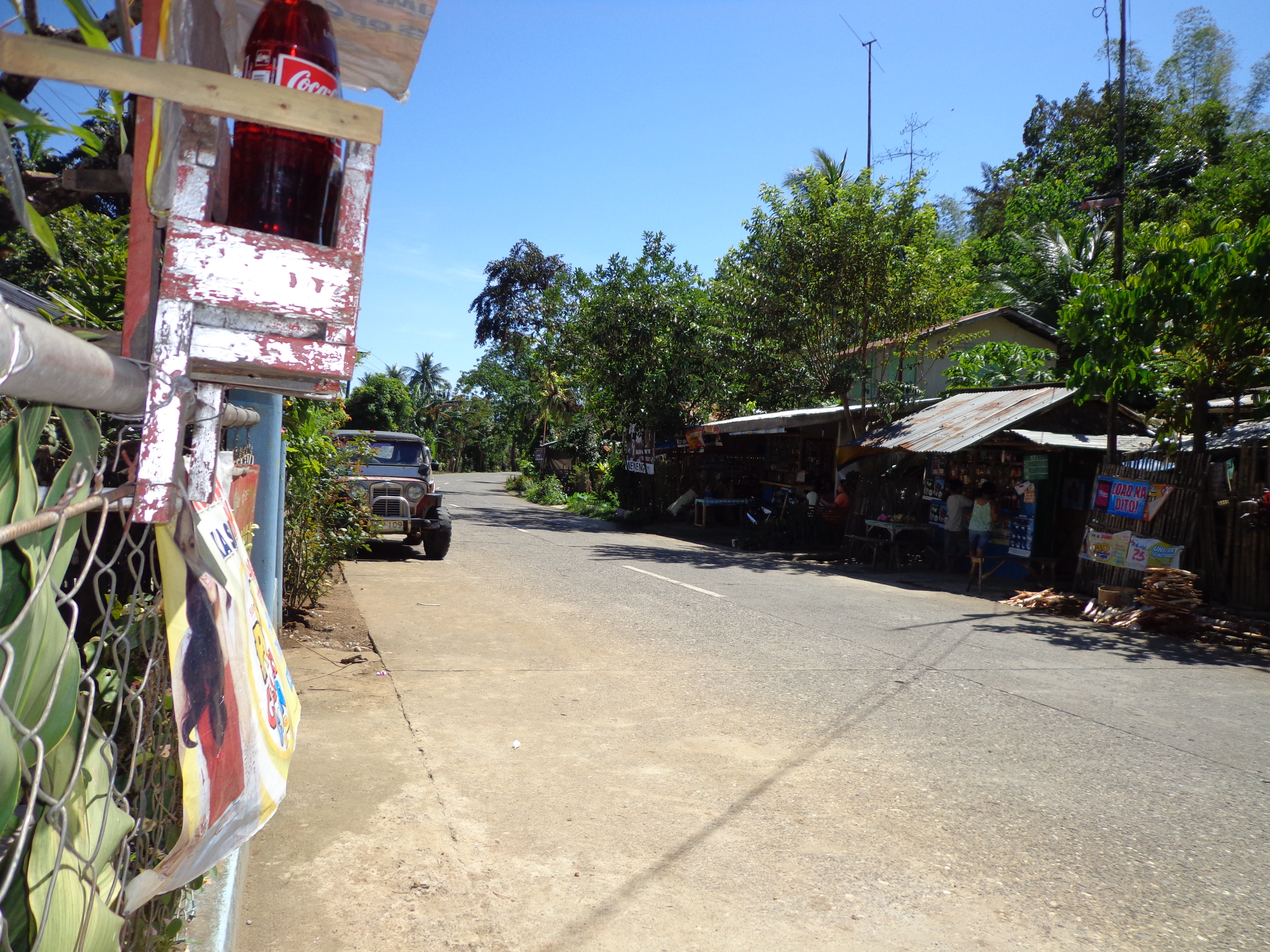 Barangay Haguimit, La Carlota City, Negros Occidental, Philippines